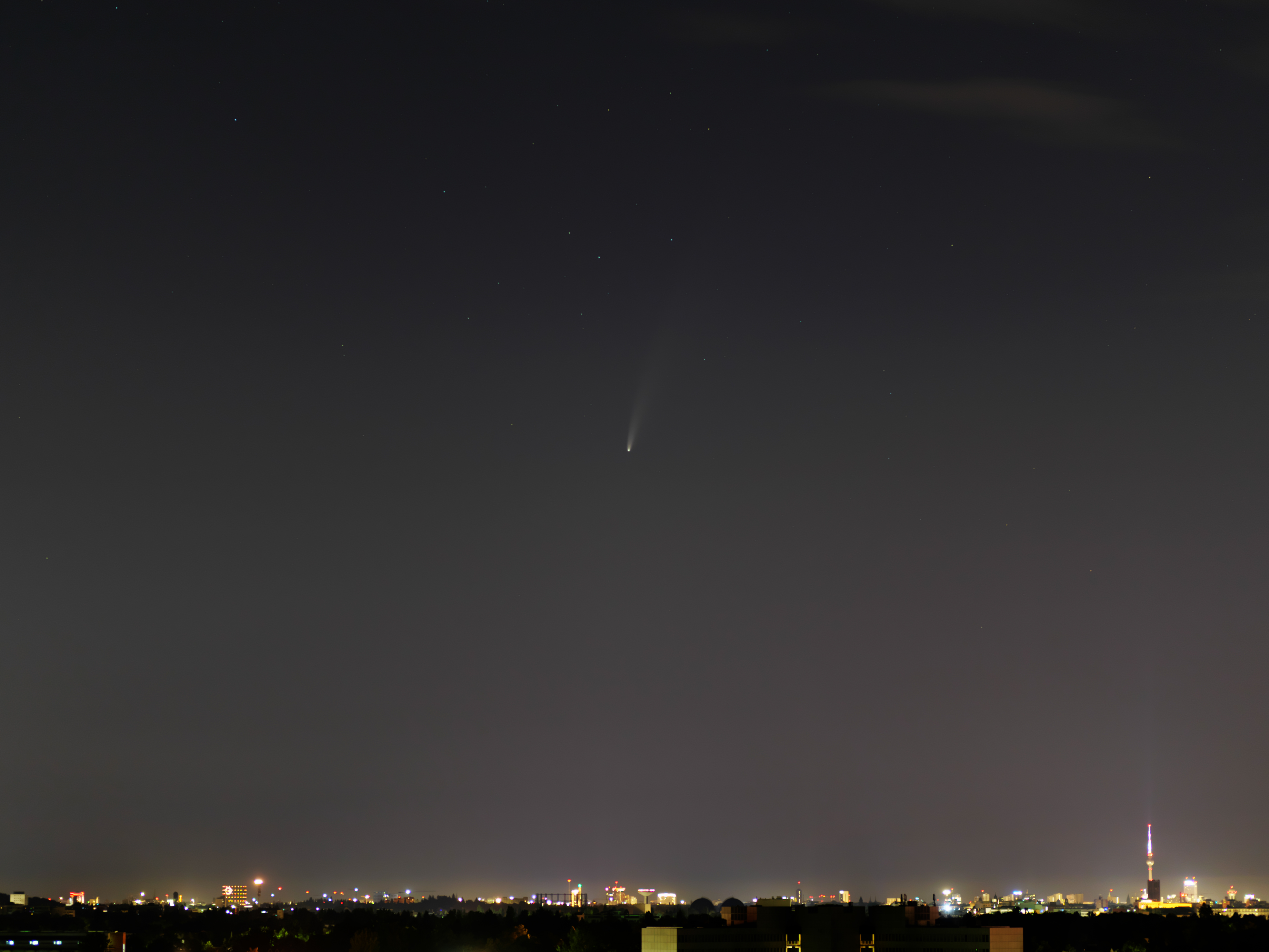 Der Komet C2020 F (NEOWISE) am nördlichen Nachthimmel über Berlin.